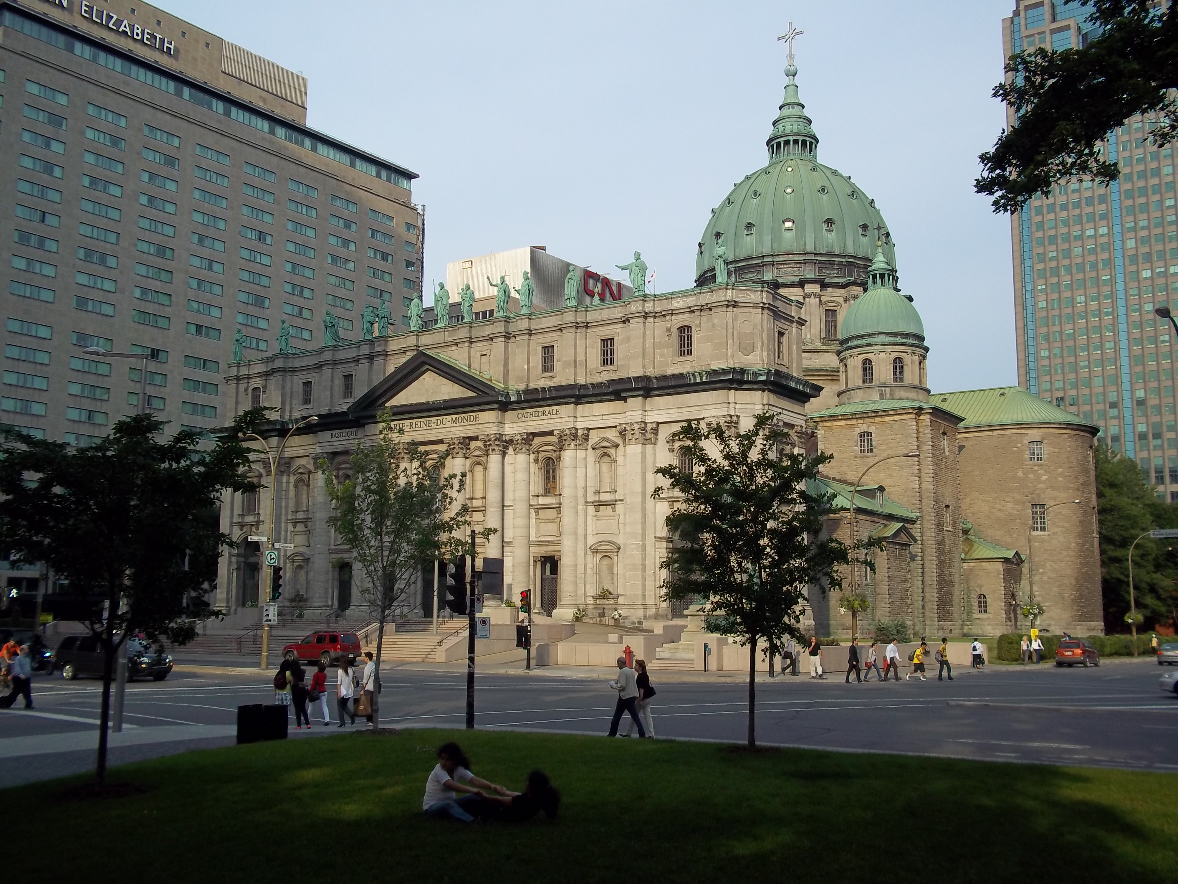 Basilique-cathédrale Marie-Reine-du-Monde, 1016, boulevard René-Lévesque Ouest, Montréal